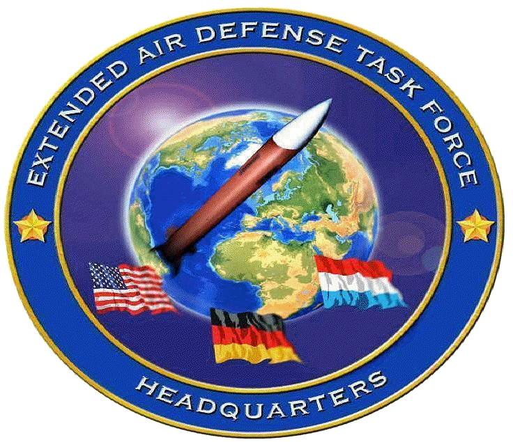 Logo der EADTF (Extended Air Defence Task Force) von 1999 bis etwa 2008